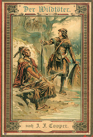 Illustration in Der Wildtöter. Eine Erzählung für die Jugend. Nach J. Fenimore Cooper frei bearbeitet von Paul Moritz. Mit vier Farbendruckbildern nach Aquarellen von G. Franz. Stuttgart, K. Thienemanns Verlag, Gebrüder Hoffmann. (1888).